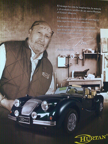 Hurtan, Descapotables, Abla, Almería, Granada, Roadster